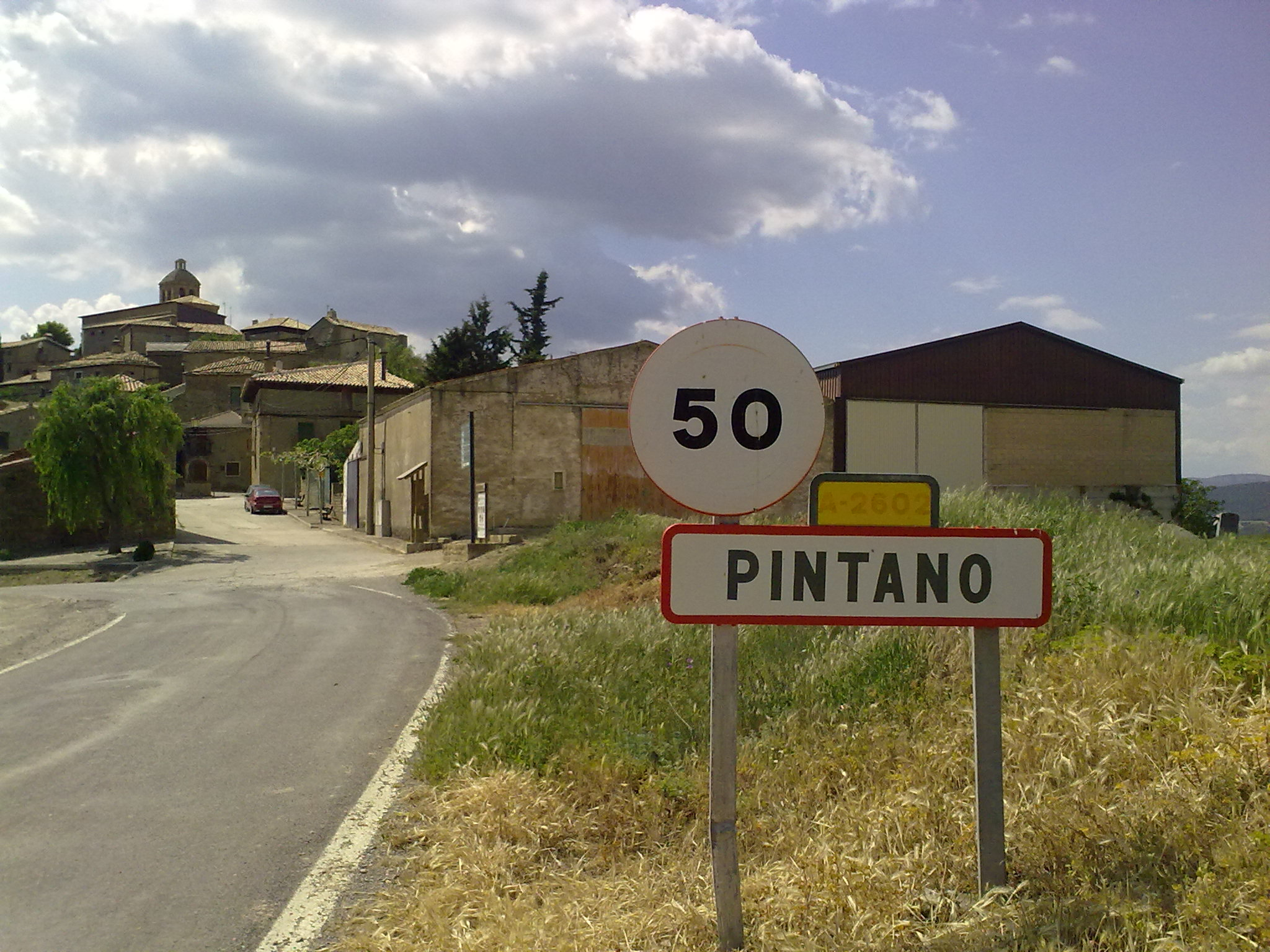 Pintano le 23 mai 2010.